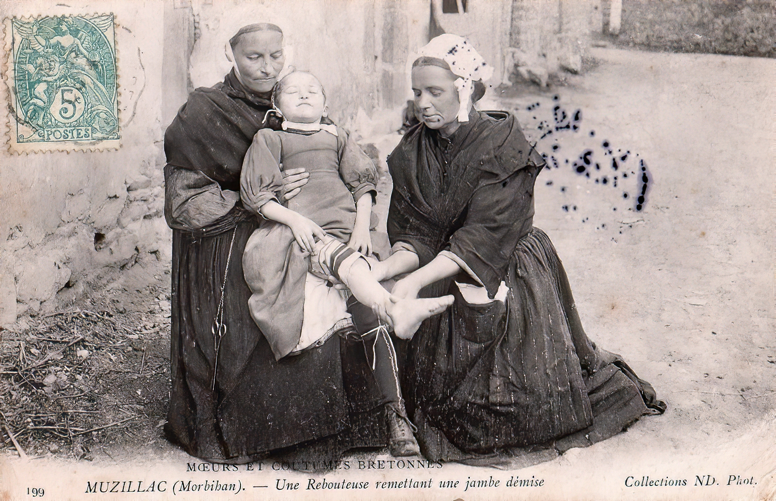 Rebouteuse (photographie de Charles Géniaux prise à Muzillac en 1890, MUCEM, Marseille).